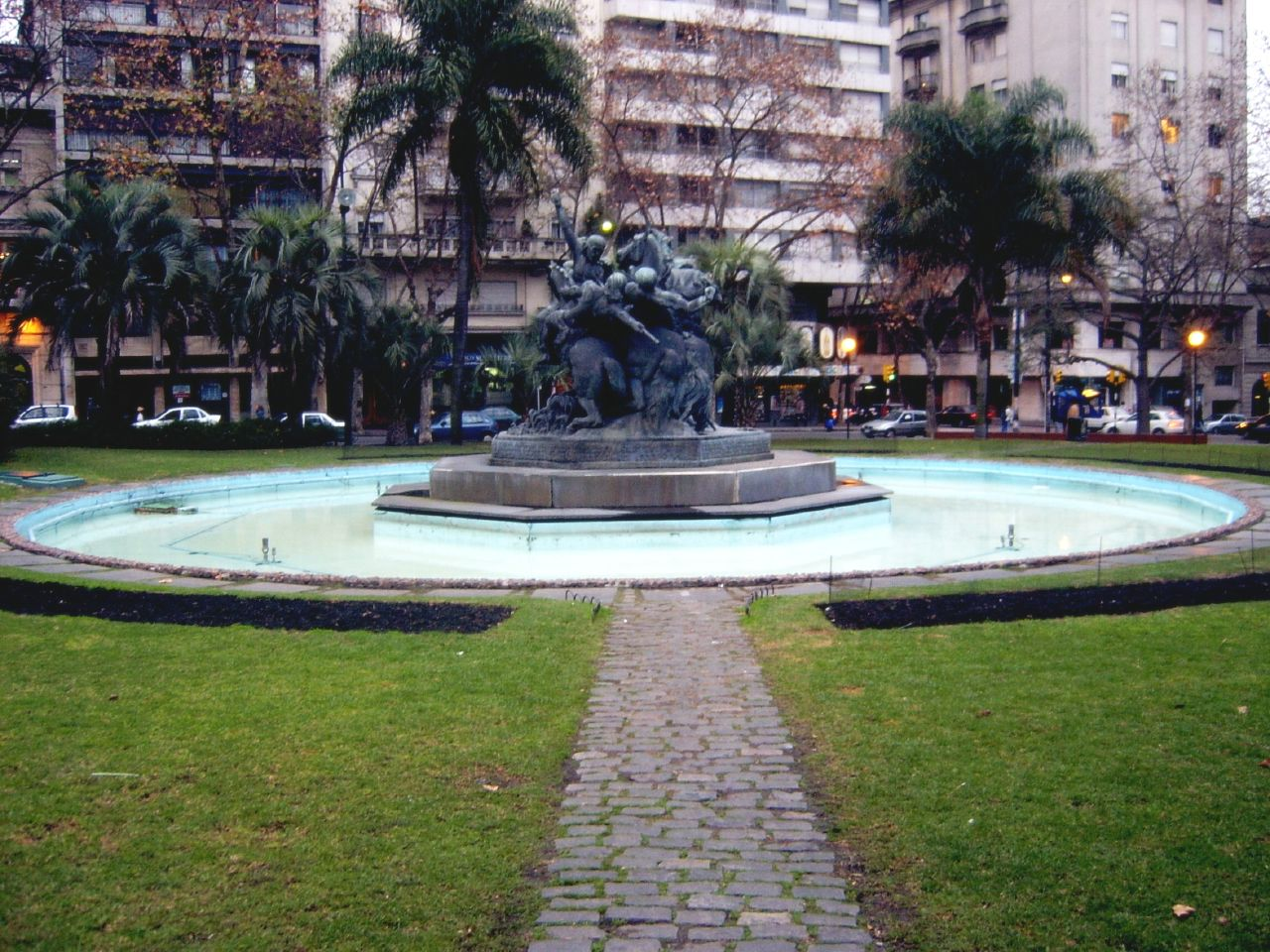 Entrevero Square in Montevideo, Uruguay.